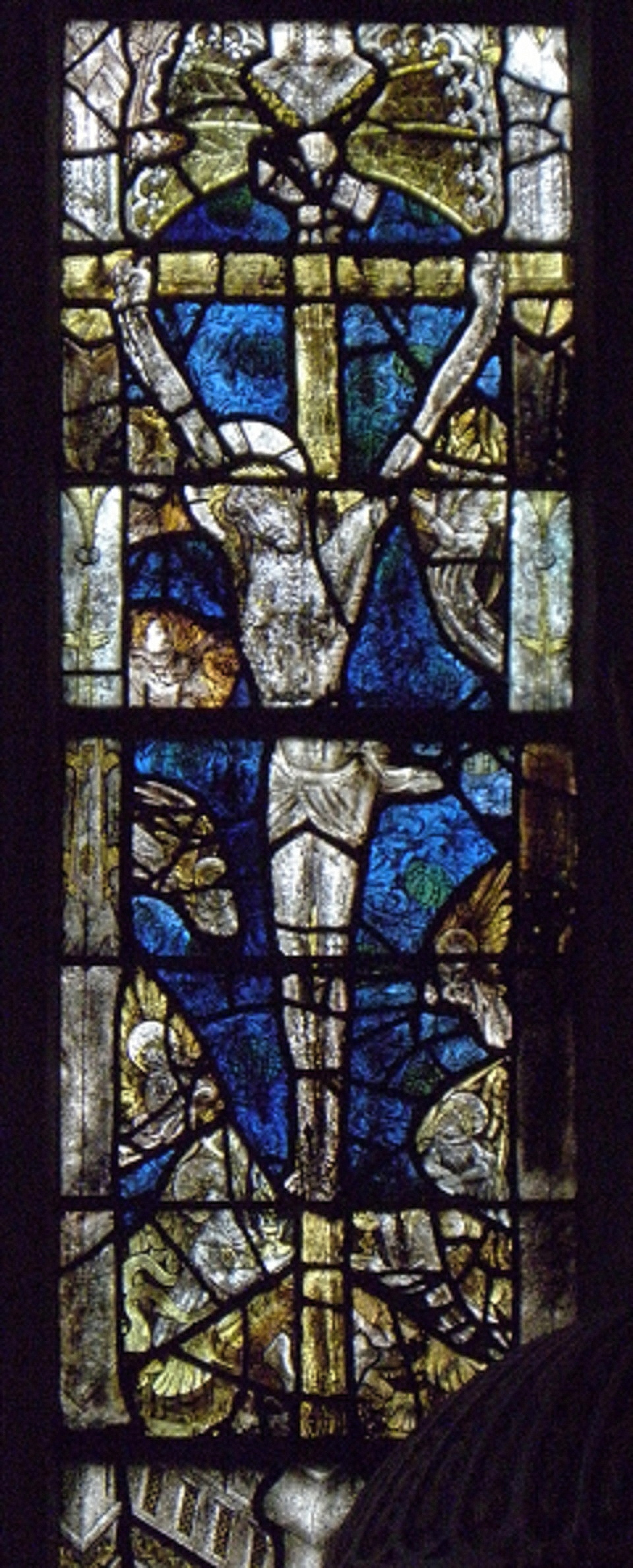 Christ en Croix. Maîtresse-vitre de l'église Notre-Dame de Runan (22).